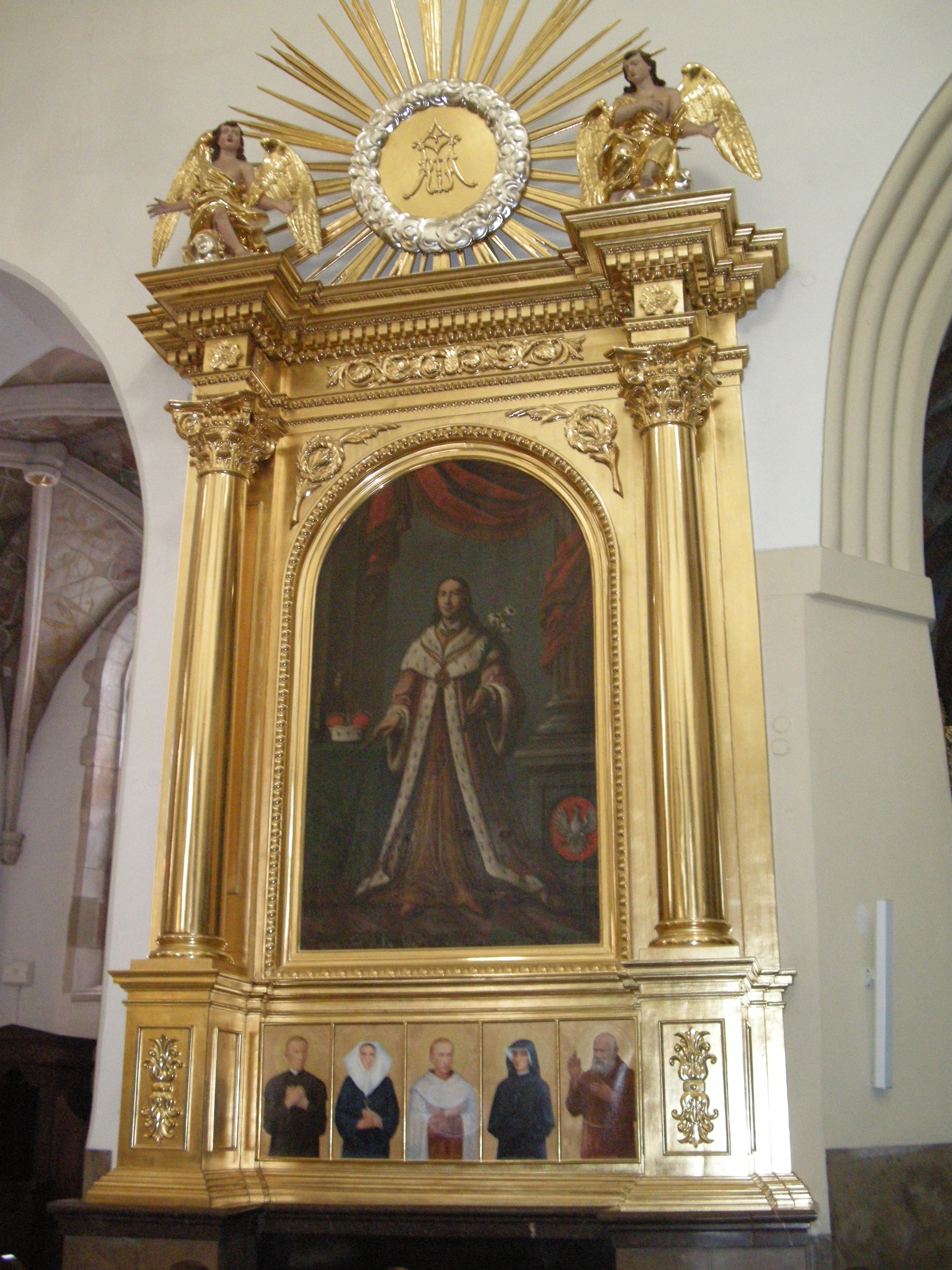 Ołtarz św. Kazimierza Królewicza z 1850 r. z herbem Polski, który przetrwał czasy rozbiorów i okupacji niemieckiej.